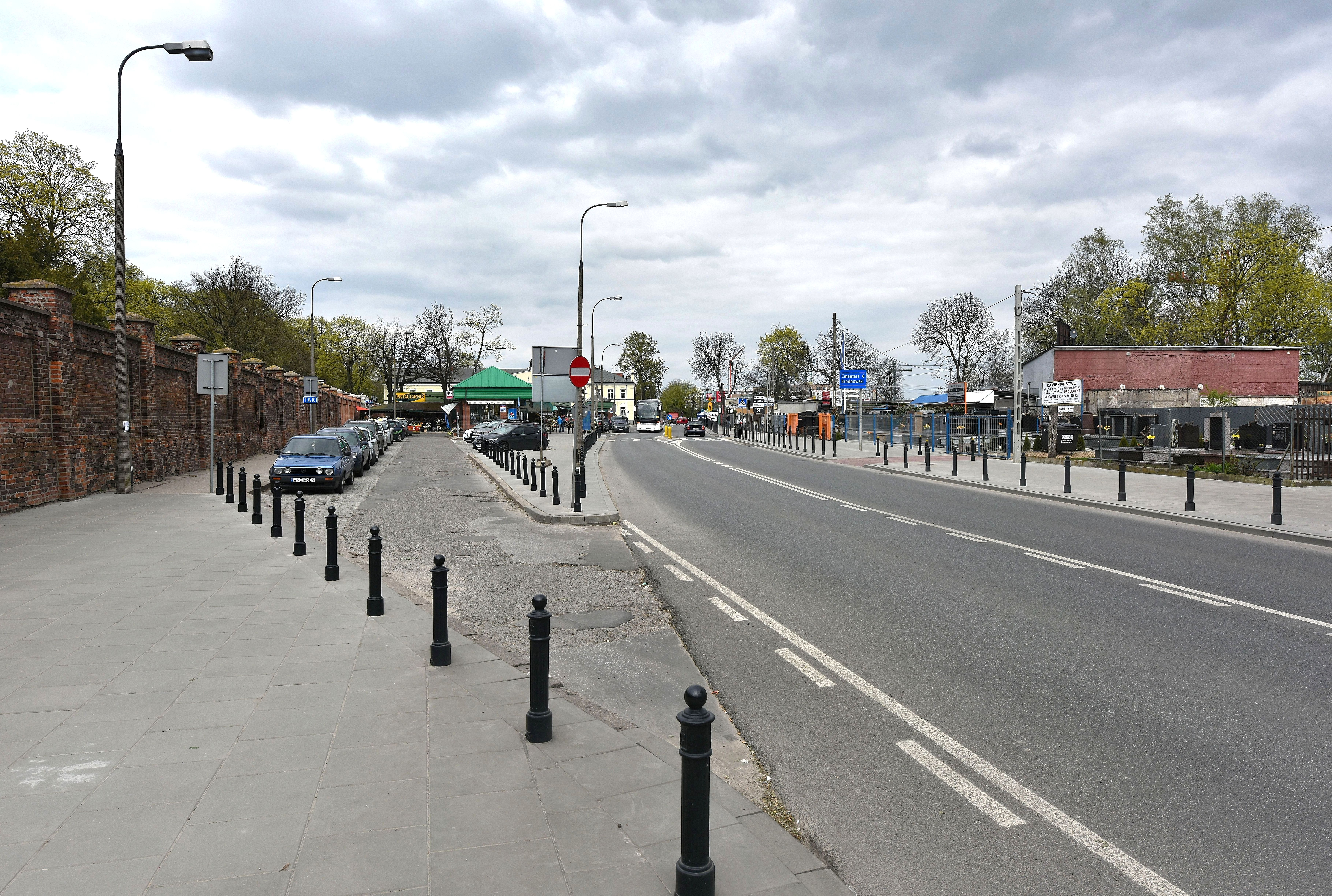 Ulica Św. Wincentego w Warszawie